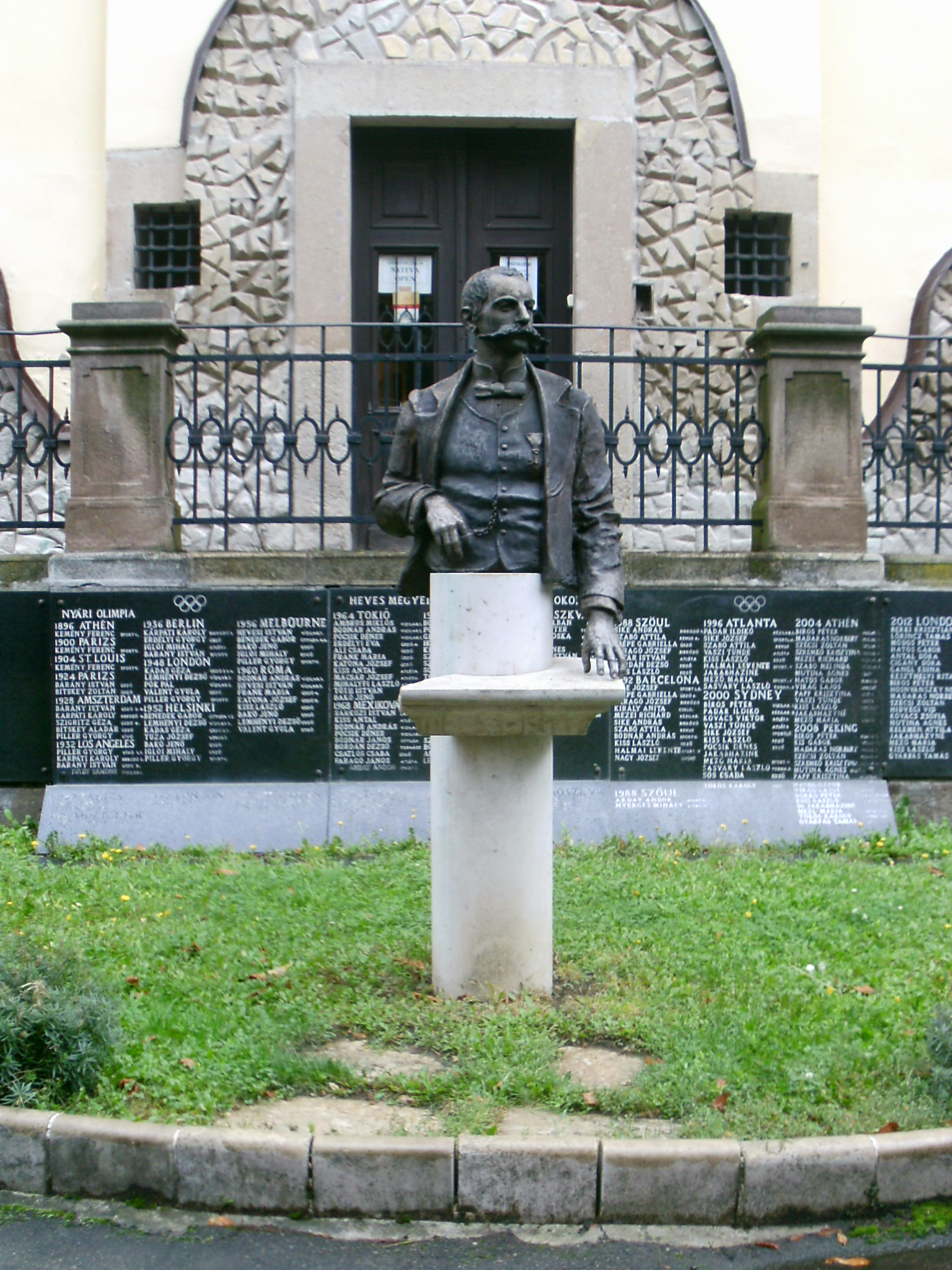 Kemény Ferenc mellszobra (Sebestyén Sándor, Kiss Sándor, Székely Ferenc (tervező), 1997), Bronz mellszobor, márvány emléktábla, gránit talapzat(?)- Heves megye, Eger, Kossuth Lajos utca 9, az egri Sportmúzeum előtt, a Megyeháza belső udvarán áll.